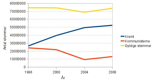 Oversigt over stemmeafgivning i Rusland